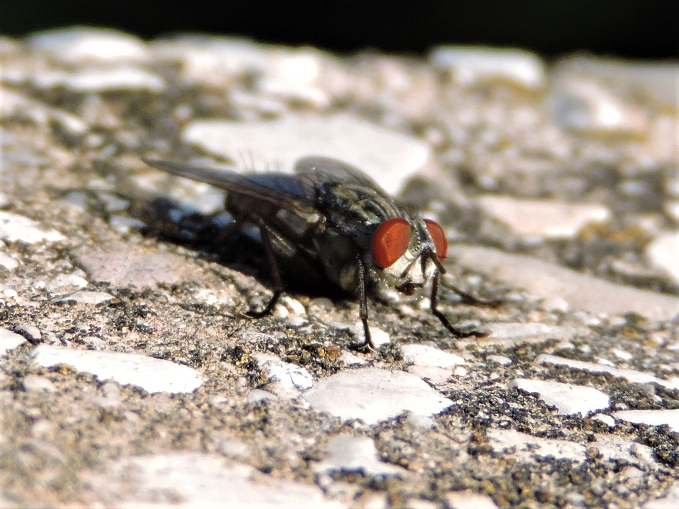 זבוב הבית במנוחה, תמונה מלפנים. תל אביב - יפו, ישראל.